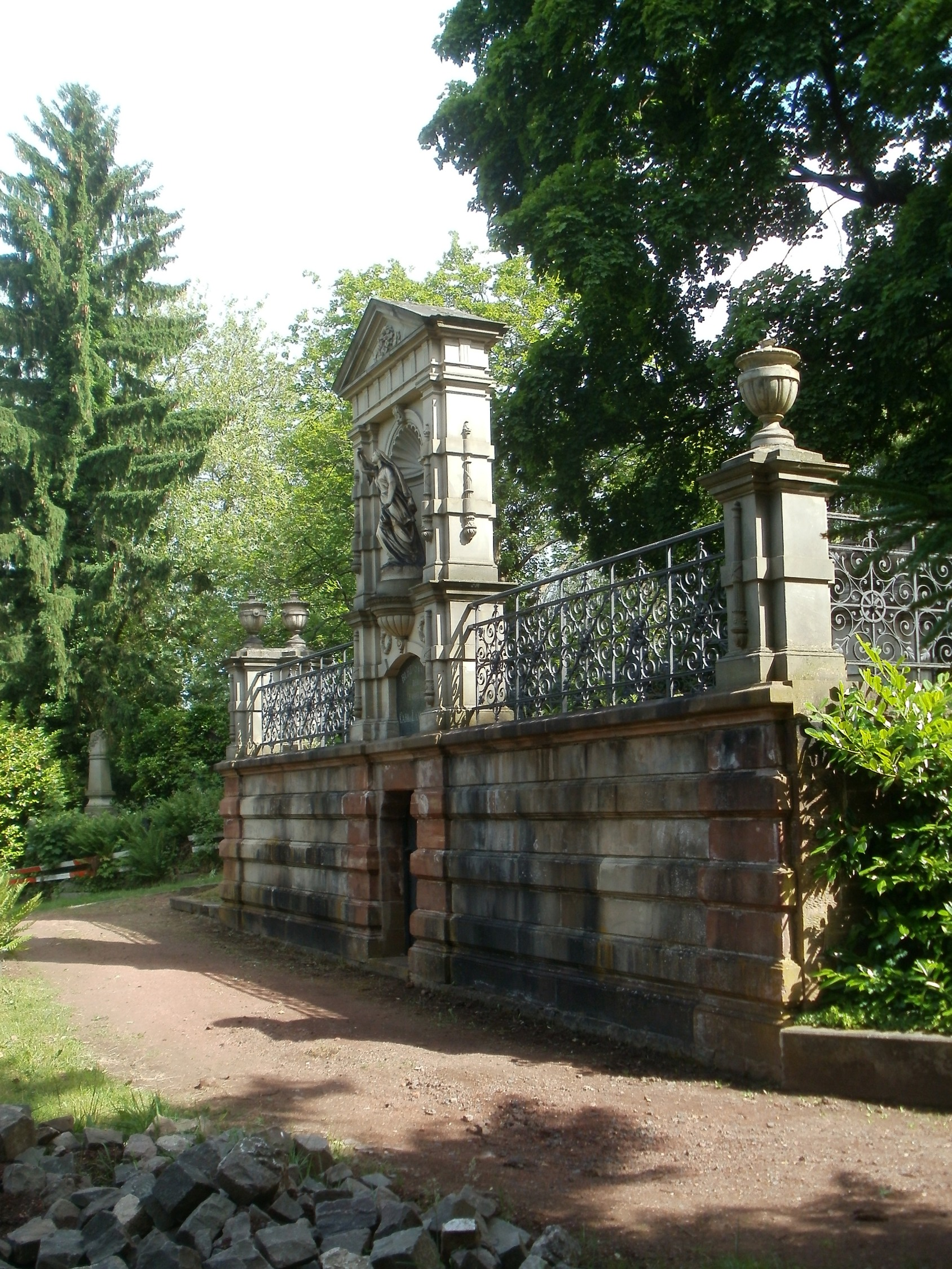 Familiengruft Lamarche (Friedhof St. Johann)